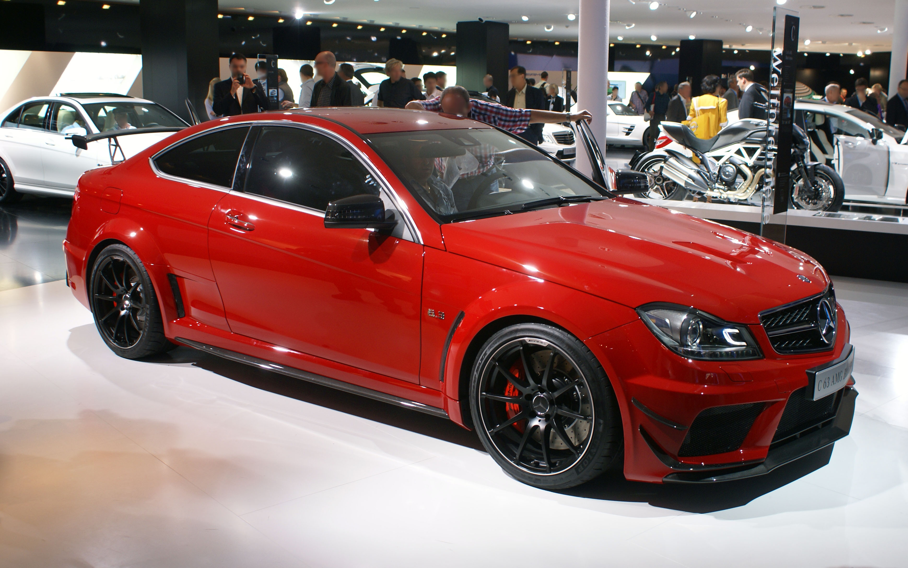 Mercedes-Benz C 63 AMG Coupé Black Series